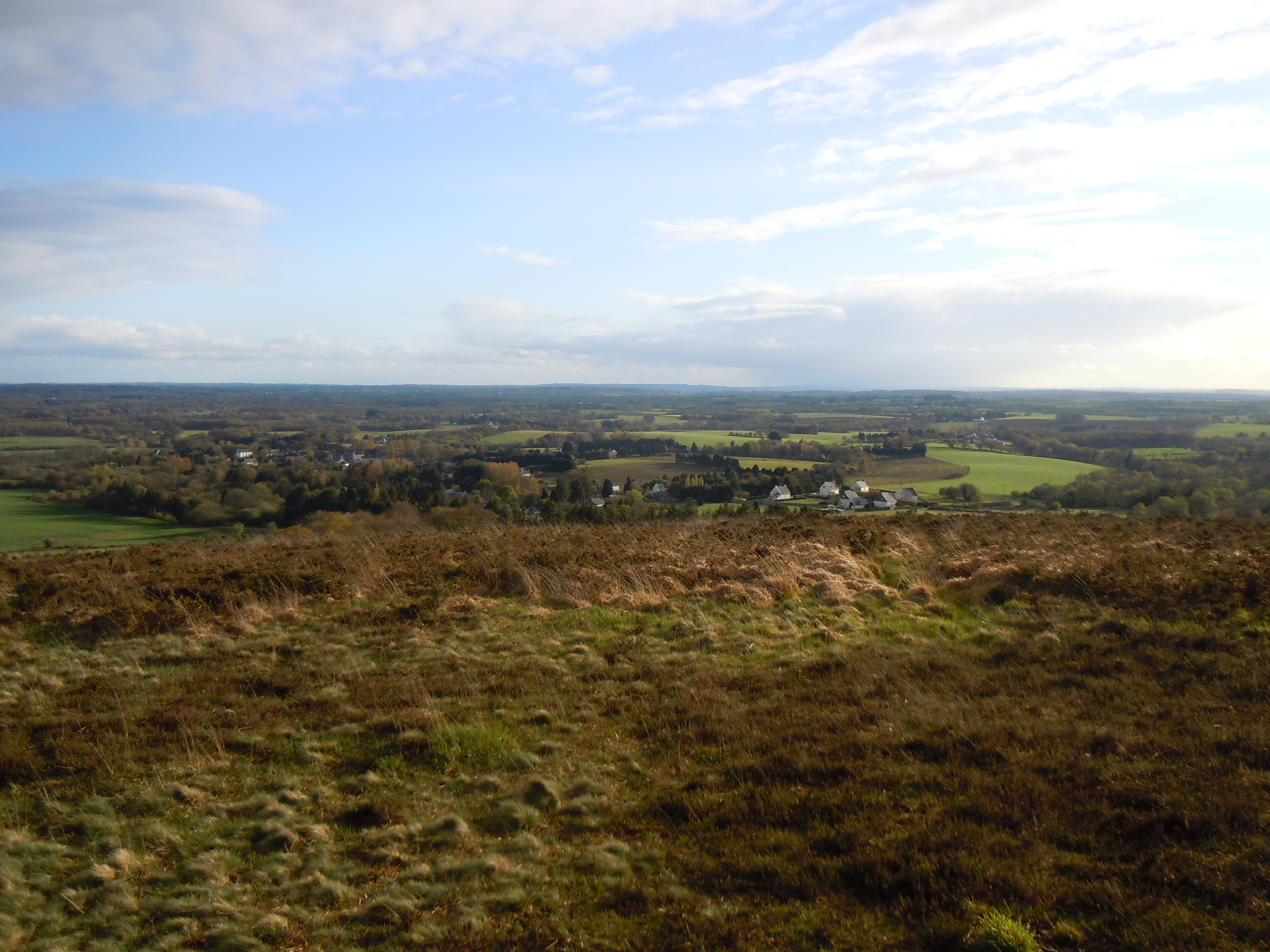 panorama depuis le sommet de la calotte Saint Joseph ( commune de Langonnet) en direction du sud. Vue en contrebas du bourg de La Trinité et du village de Botquelvez